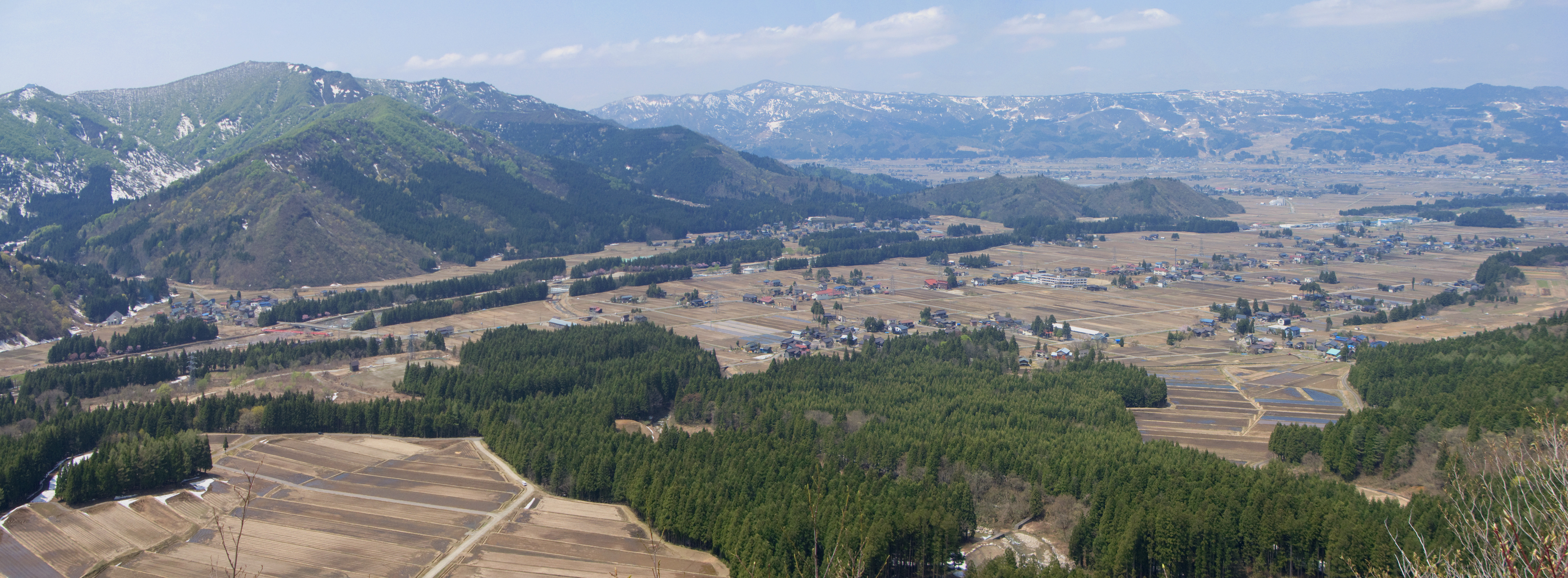 古峰山第一展望台から第二上田地区の眺望